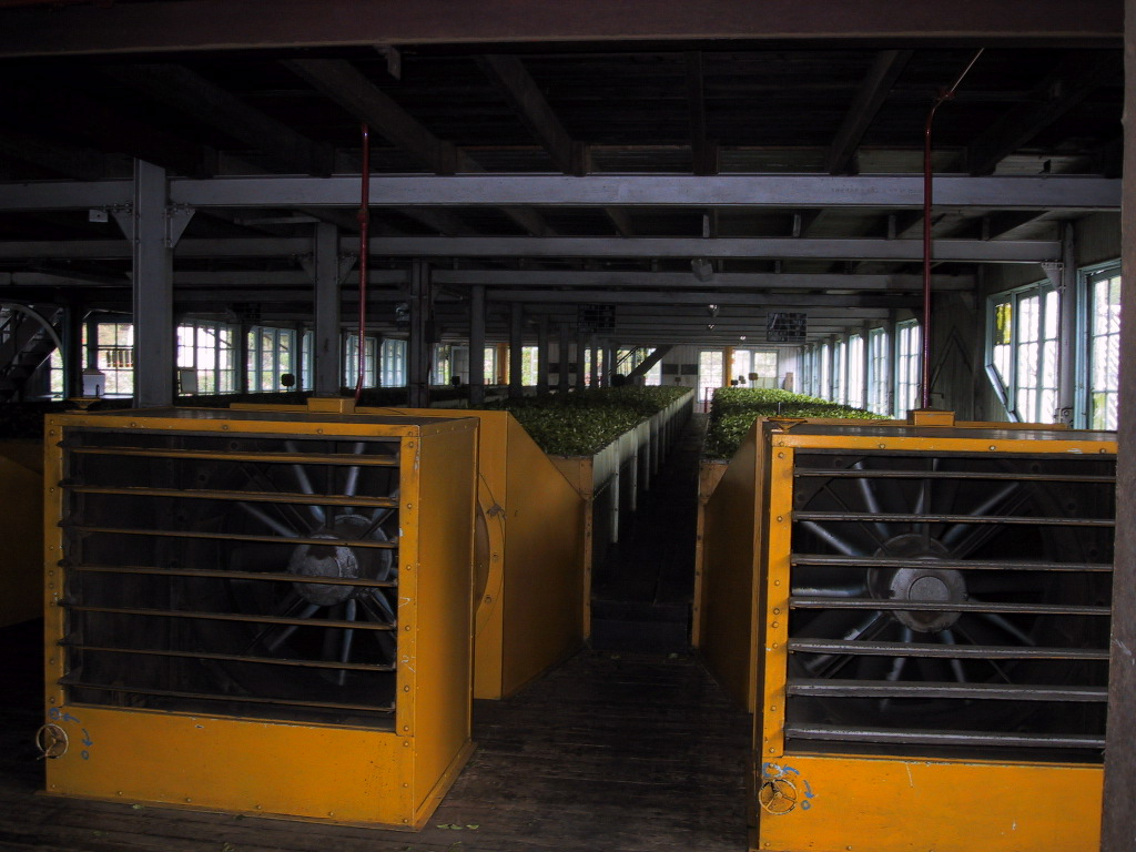 Description: Séchage des feuilles de thé Nuwara EliyaSource: Cécile Sprimont 2003Licence